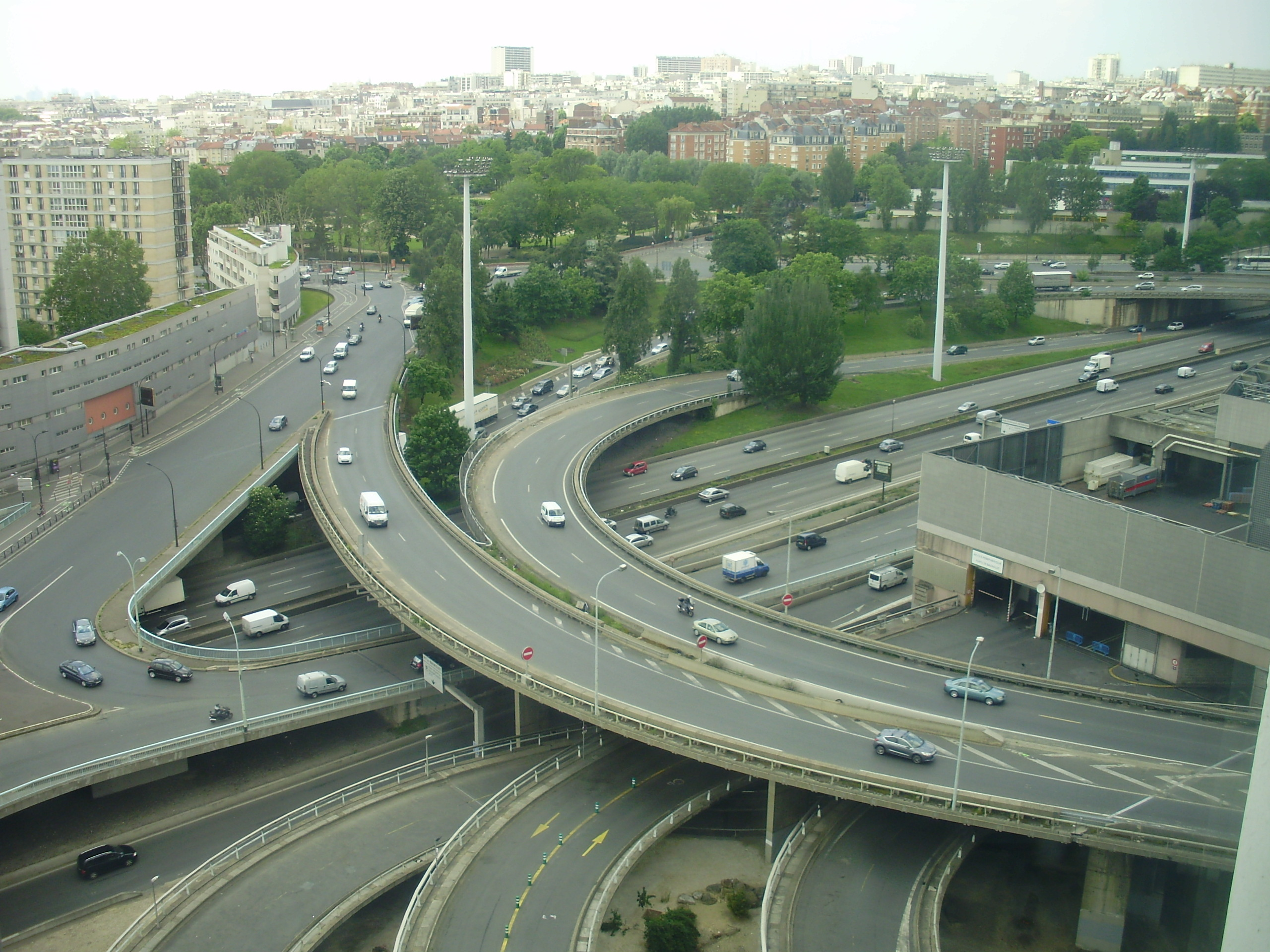 Échangeur de la porte de Bagnolet sur le boulevard périphérique de Paris, France, dans le 20e arrondissement de Paris